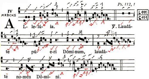 Inizio dell'Alleluia "laudate pueri" tratto dal "graduale triplex".